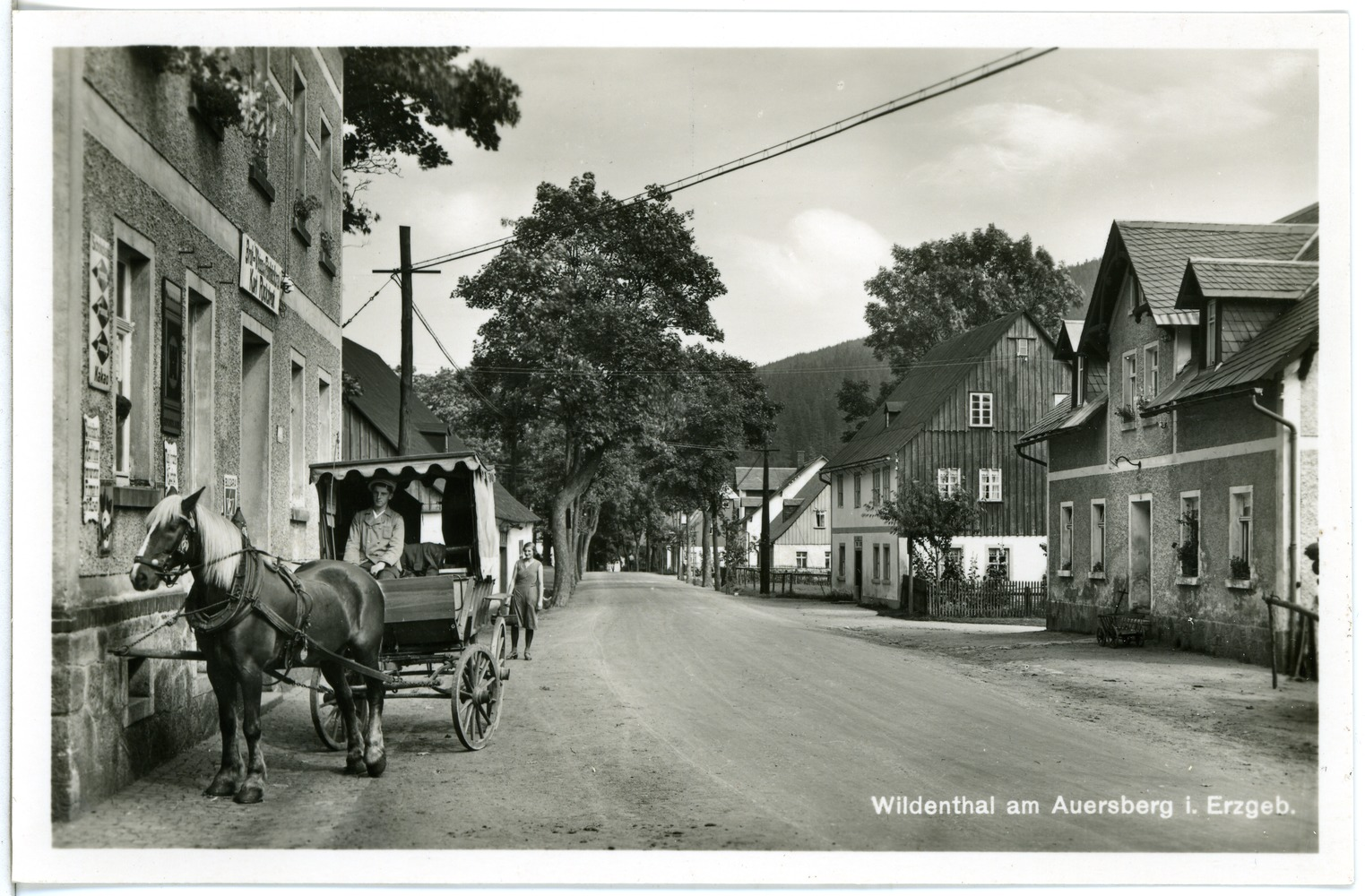 Wildenthal; Ortsansicht mit Pferdekutsche This postcard is from publisher Brück & Sohn in Meißen ( postcard has a unique number 26129 and is available in a higher resolution at the publisher. This images was uploaded in a cooperation project between Wikipedians and the publisher.